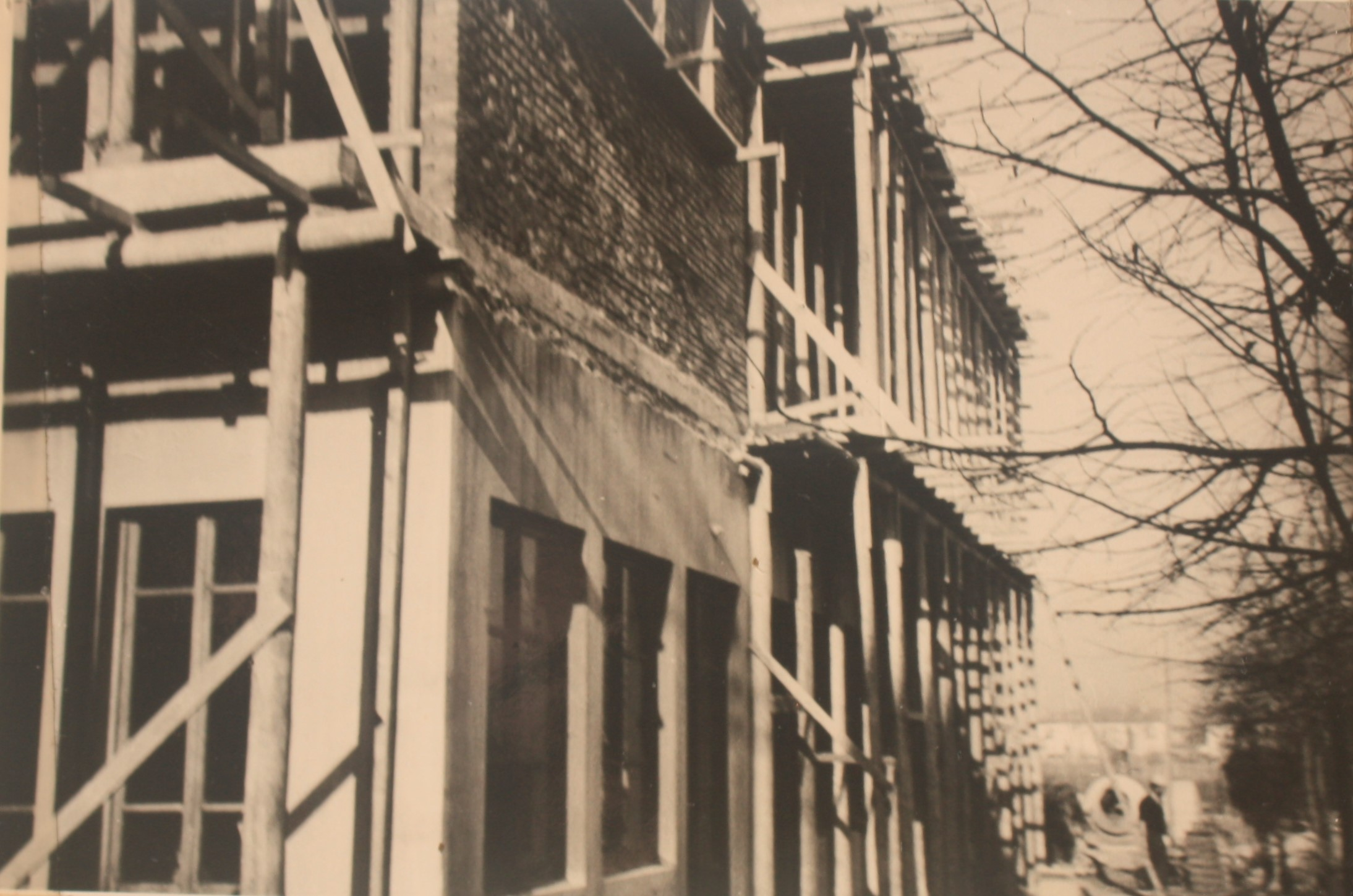 Costruzione del "Circolino" della Chiesa di San Quirico a Legnaia, foto in bianco e nero